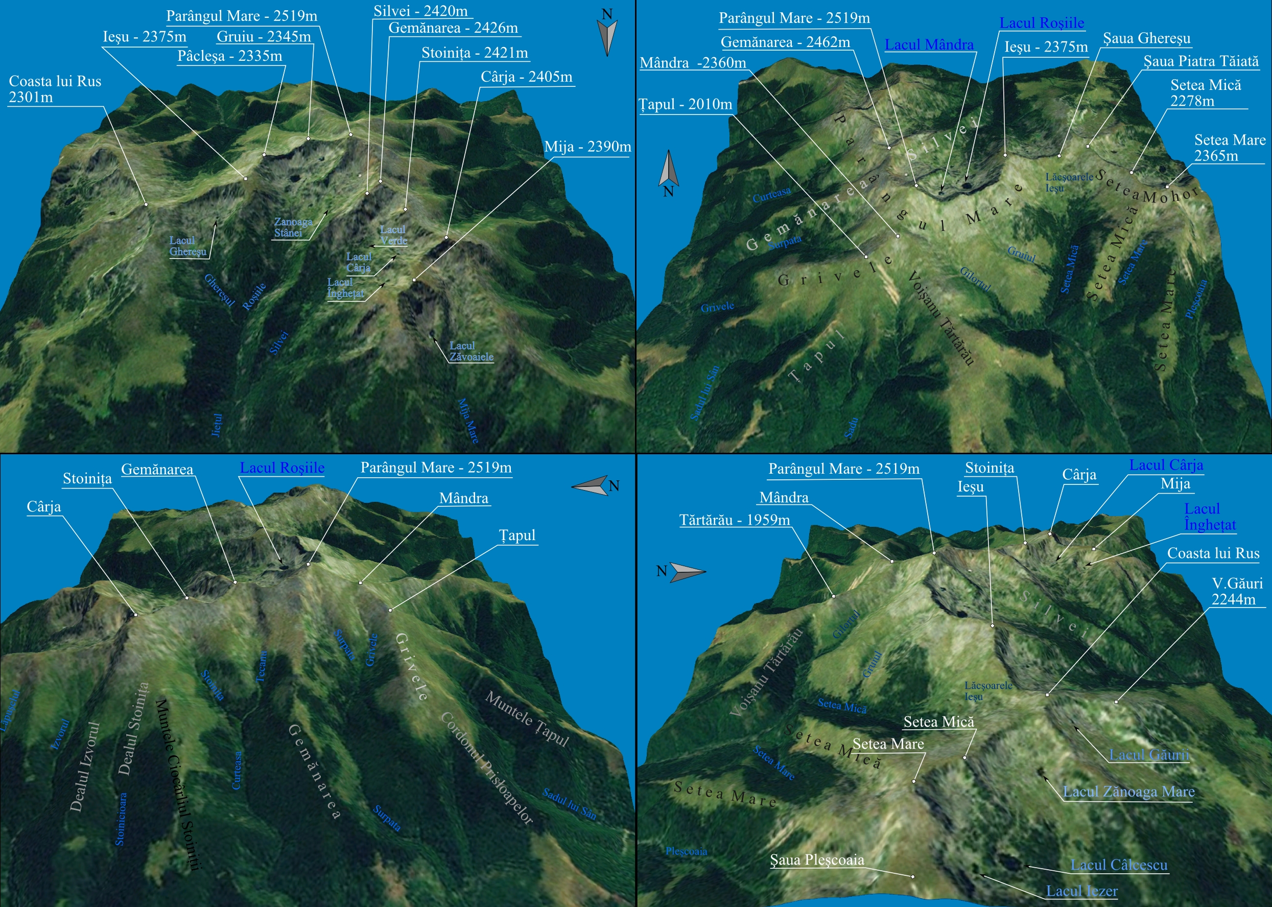 Hartă 3D pentru Parângul Mare, Romania. Imagine realizata cu:1. Date SRTM furnizate de NASA si textura World Imagery.2. Global Mapper şi Inkscape folosind Texte şi Background al reliefului.Pentru modificări ale imaginii se urmează paşii:1. Se descarcă fişierul Background şi Textele.2. Se suprapun Textele peste Background în Inkscape.3. Se fac modificările în Inkscape.4. Se exportă imaginea noua formată din Inkscape într-un fişier JPG.5. Se încarcă noua imagine JPG, cu upload.6. Se încarcă noul fişier SVG cu Texte, cu upload.